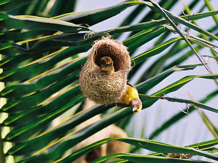 A Baya Weaver pair at nest, Picture Taken at Kotaballappalli, Karnataka, India.